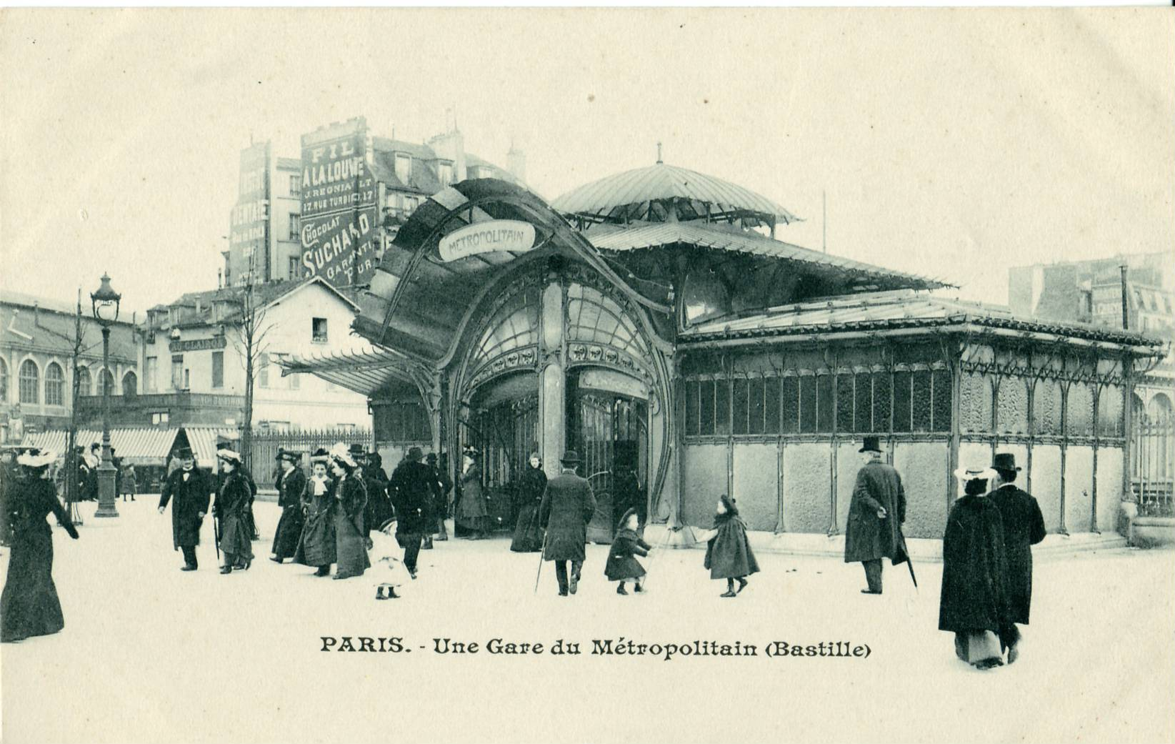 Carte postale ancienne Paris : Une gare du Métropolitain (Bastille)